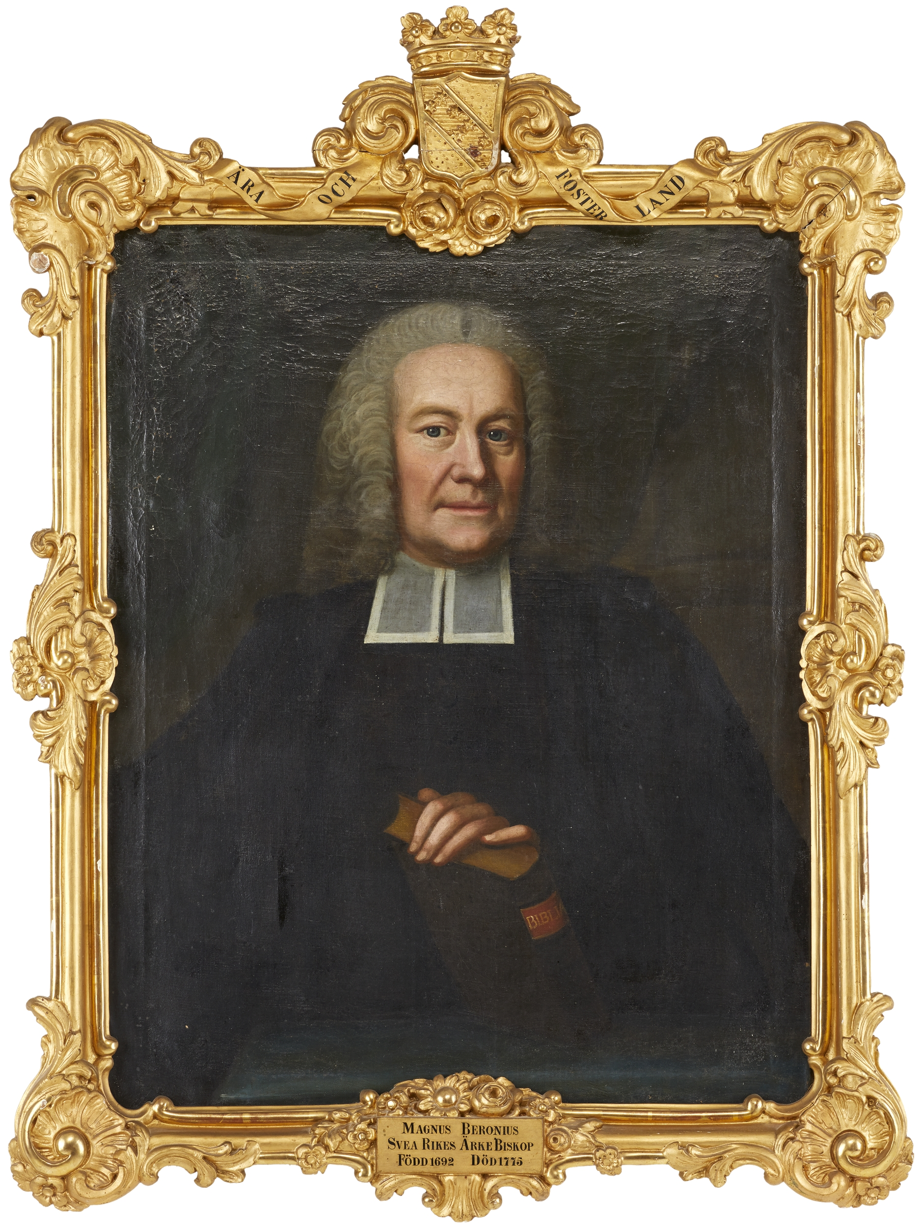 Porträtt av ärkebiskop Magnus Beronius (1692-1775), iklädd prästrock med elva om halsen. Hållandes bibeln med vänster hand. Porträtt från 1742 av Lorens Pasch d.ä.